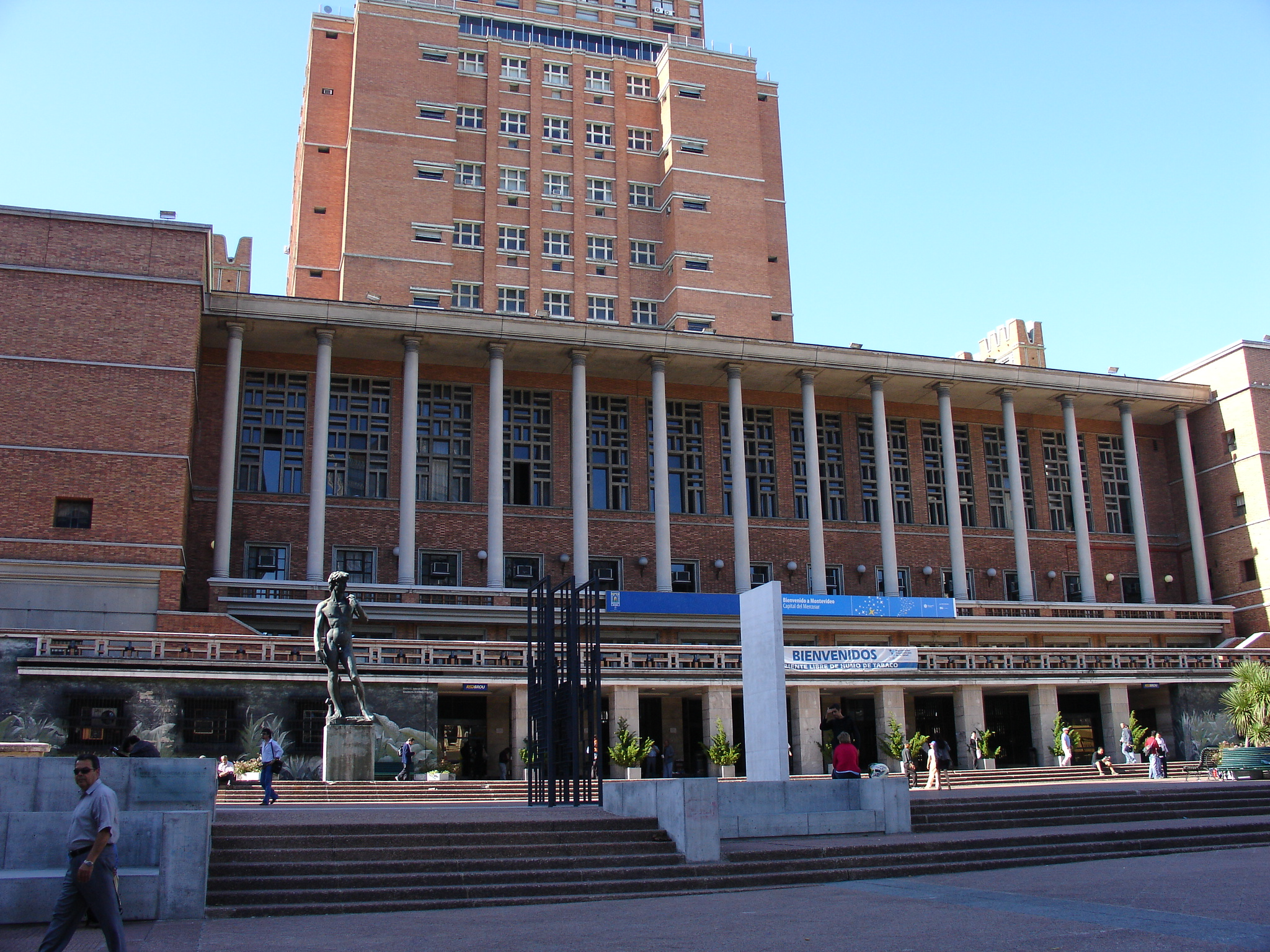 Intendencia Municipal de Montevideo, Uruguay.